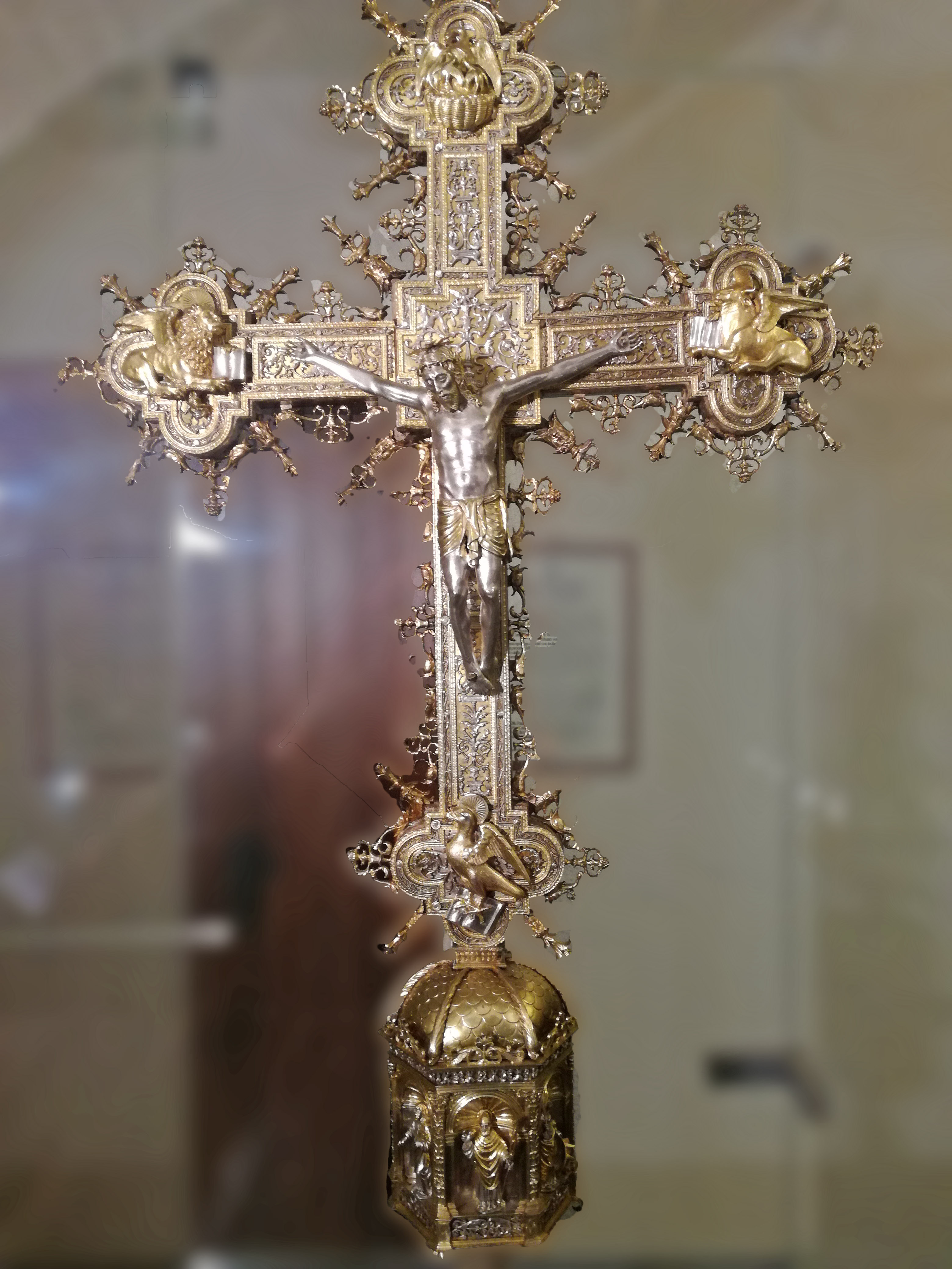 Museo del Tesoro dell'Incoronata (Lodi)